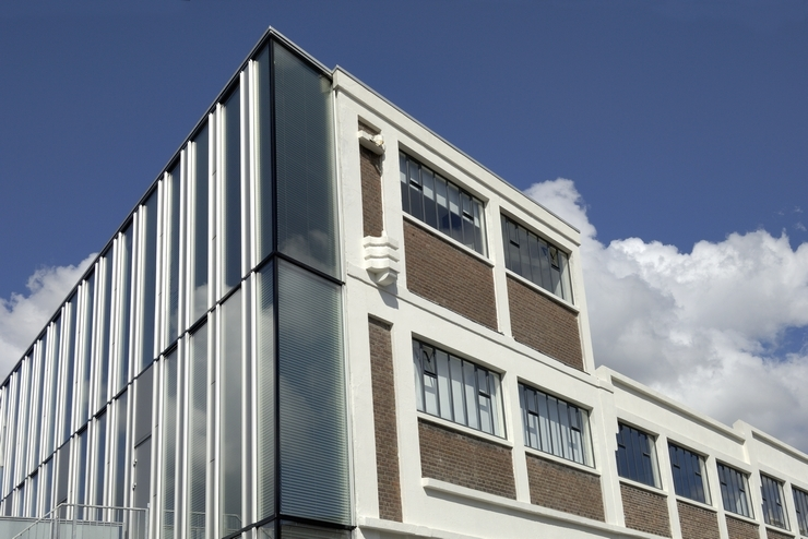 Deze foto is gemaakt in 2006 door de auteur van dit artikel, bewoner van het fabriekscomplex.